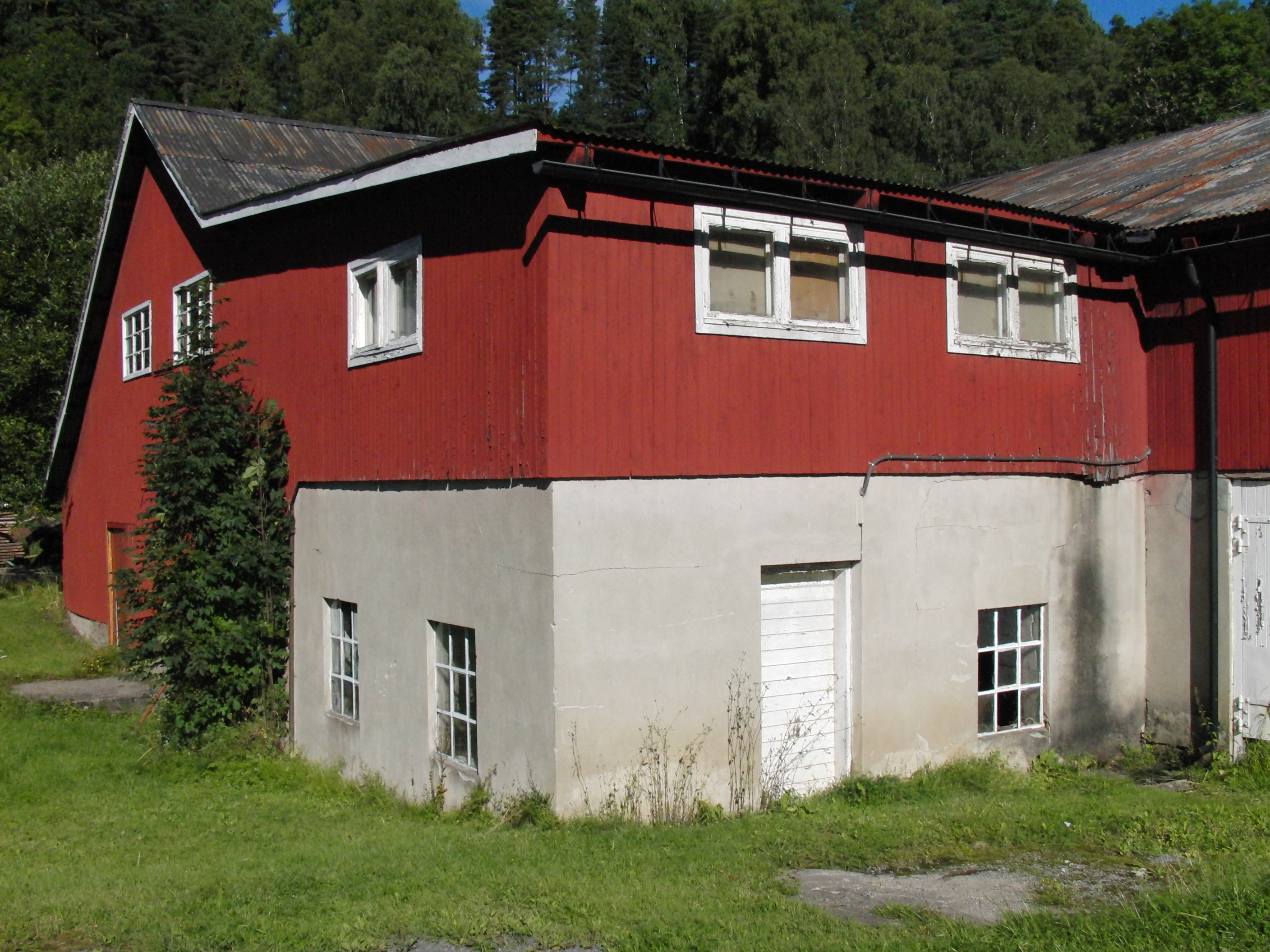 Grøtte kraftverk